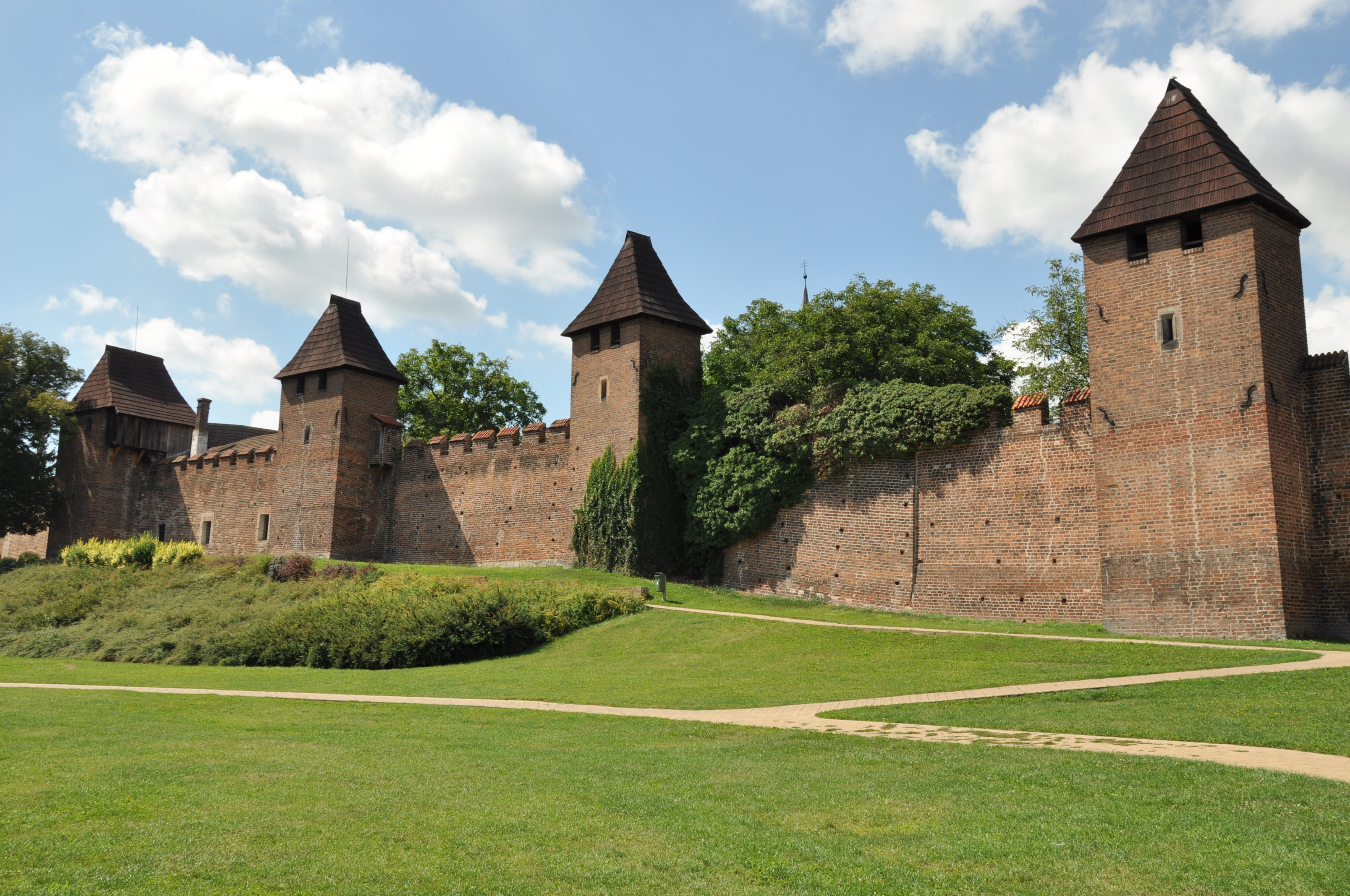 Městské opevnění (Nymburk), Hradební, Jízdecká, Na Rejdišti, Na Přístavě, Nymburk